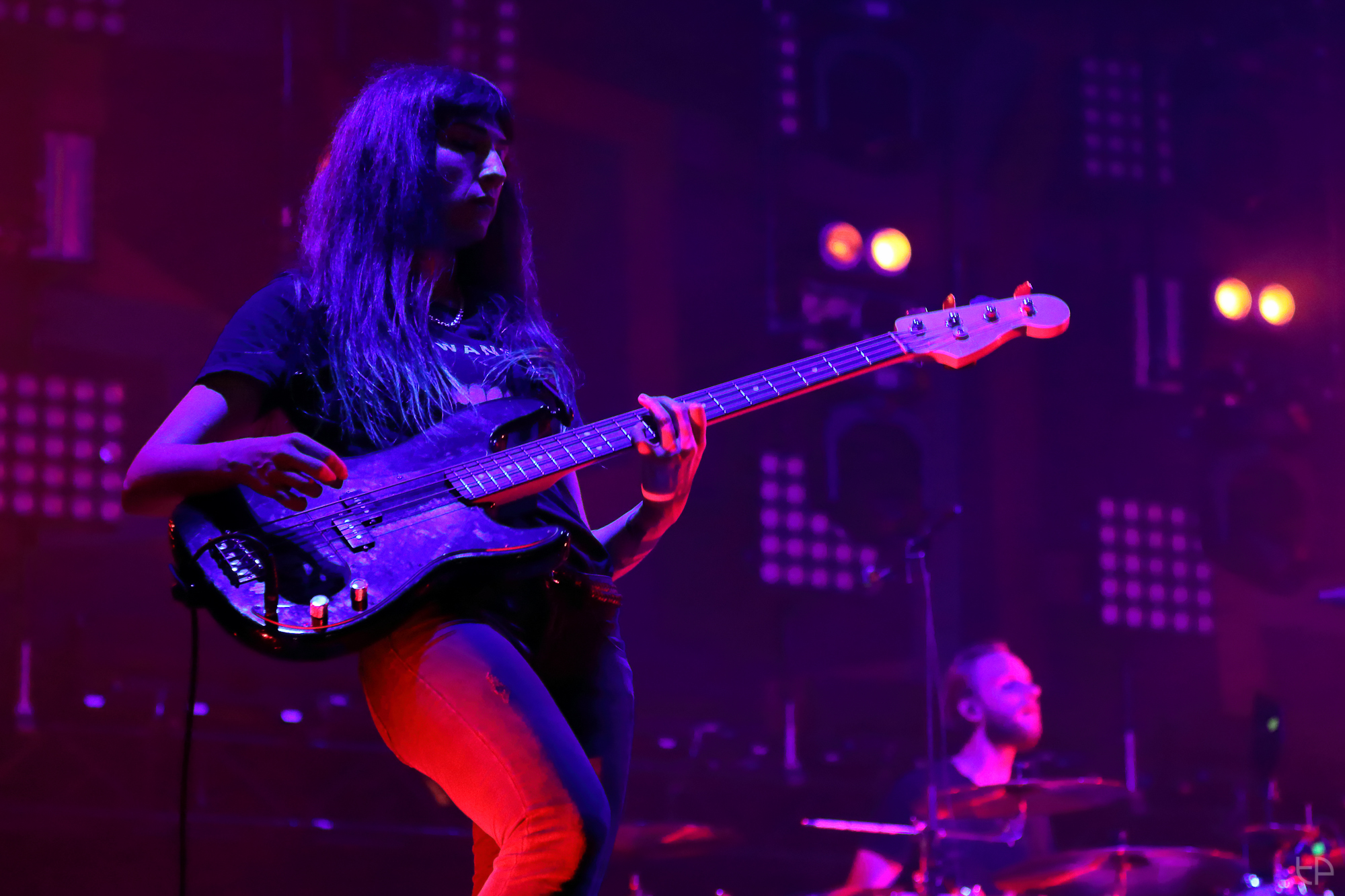 4L8A3230_web